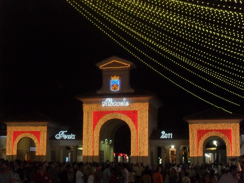 Iluminación Puerta de Hierros 2011